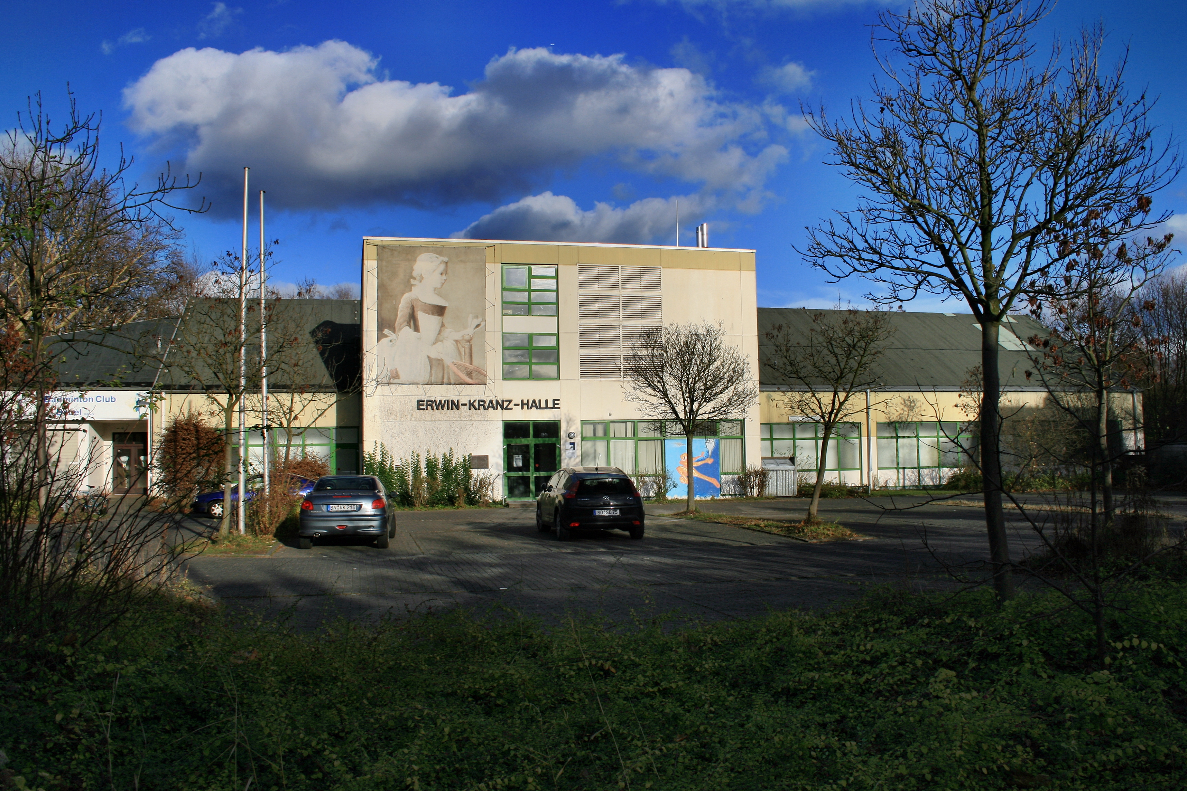 Erwin-Kranz-Sporthalle in Bonn-Beuel (Limpericher Straße 141, 53225 Bonn-Beuel)